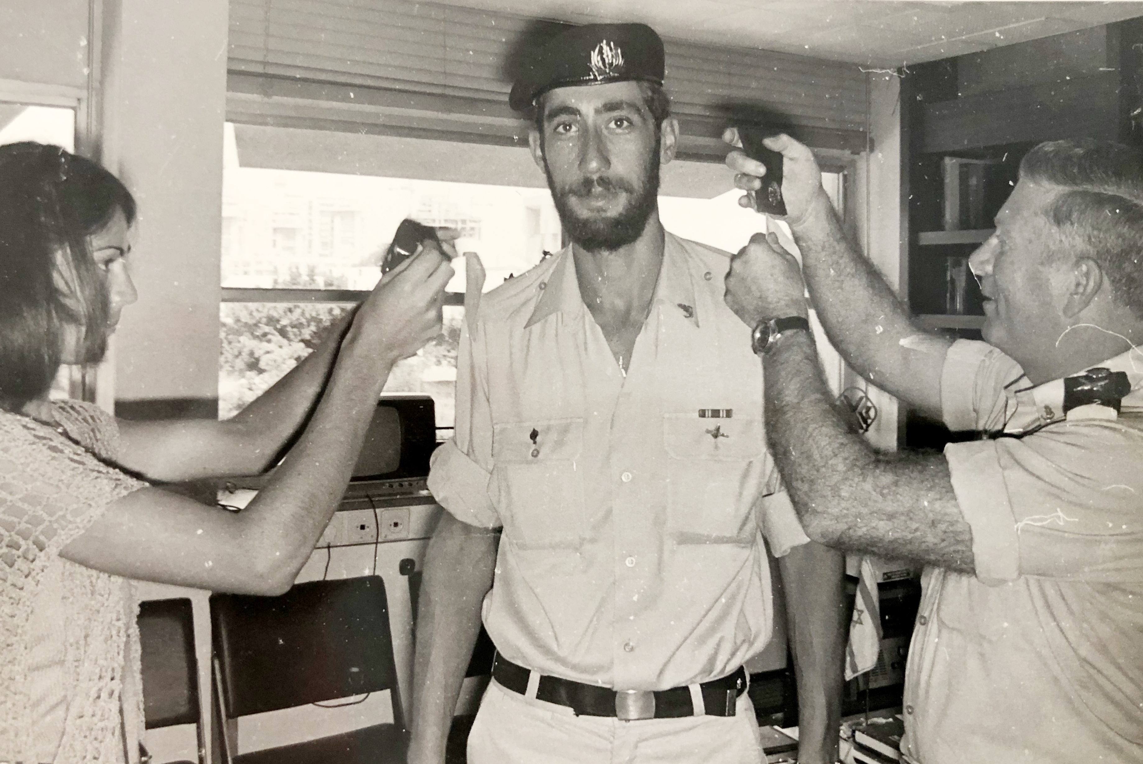 אלי רונן מקבל דרגת רס"ן ספטמבר 1980